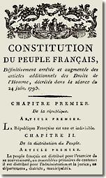 De in 1793 door Jean-Jacques Gandini uitgeschreven Grondwet is nooit in gebruik genomen. Daarentegen opteerde het Directoire in 1795 voor een tekst die in grote lijnen overeenkwam met de in 1789 opgestelde Grondwet. De aanleiding voor deze Déclaration des Droits de l'Homme et du Citoyen werd gegeven door enkele decreten in september van het jaar 1792. Op 21 september 1792 gaat de Convention Nationale of Constituante akkoord met volgende zaken: 1. Dat er geen Grondwet kan bestaan tenzij zij wordt aanvaard door het volk. 2. Dat het volk en alle grondgebied onder de hoede van de staat vallen. Op diezelfde dag en de dag erna: "La Convention Nationale décrète à l'unanimité que la royauté est abolie en France." Op 25 september 1792 bekrachtigt de Convention Nationale dat Frankrijk één en onverdeeld(en onverdeelbaar) is.